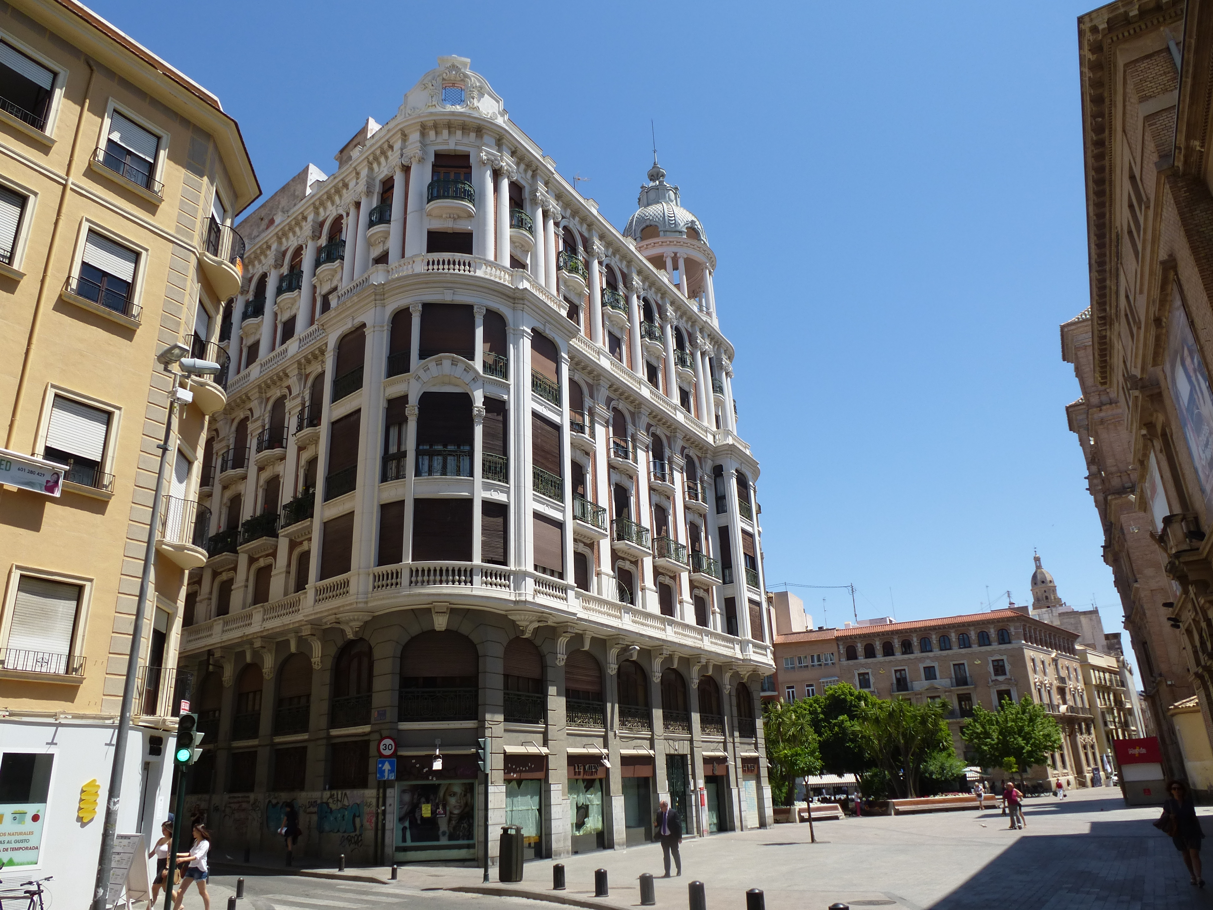 murcie